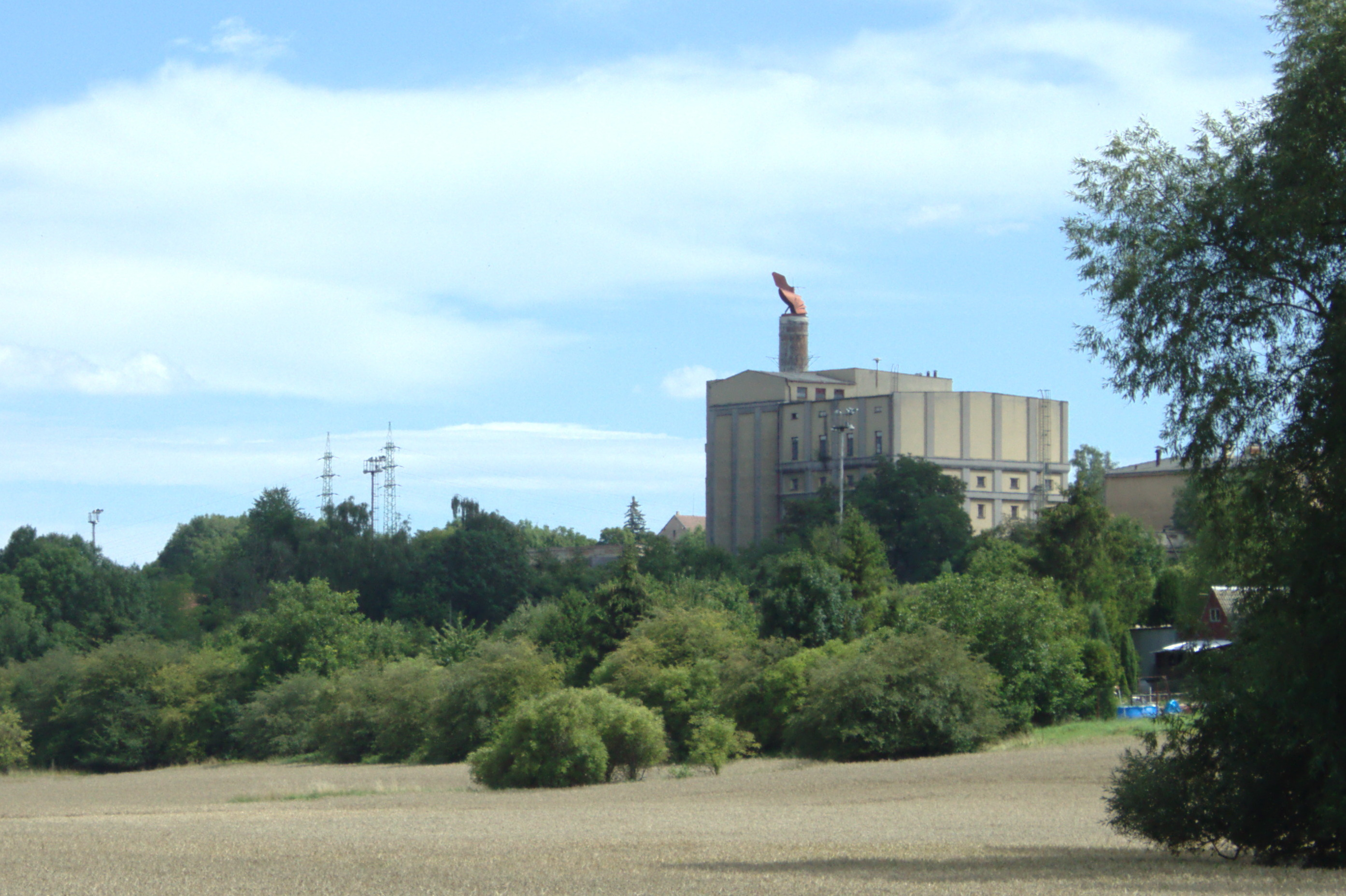 Pivovar Louny od severozápadu